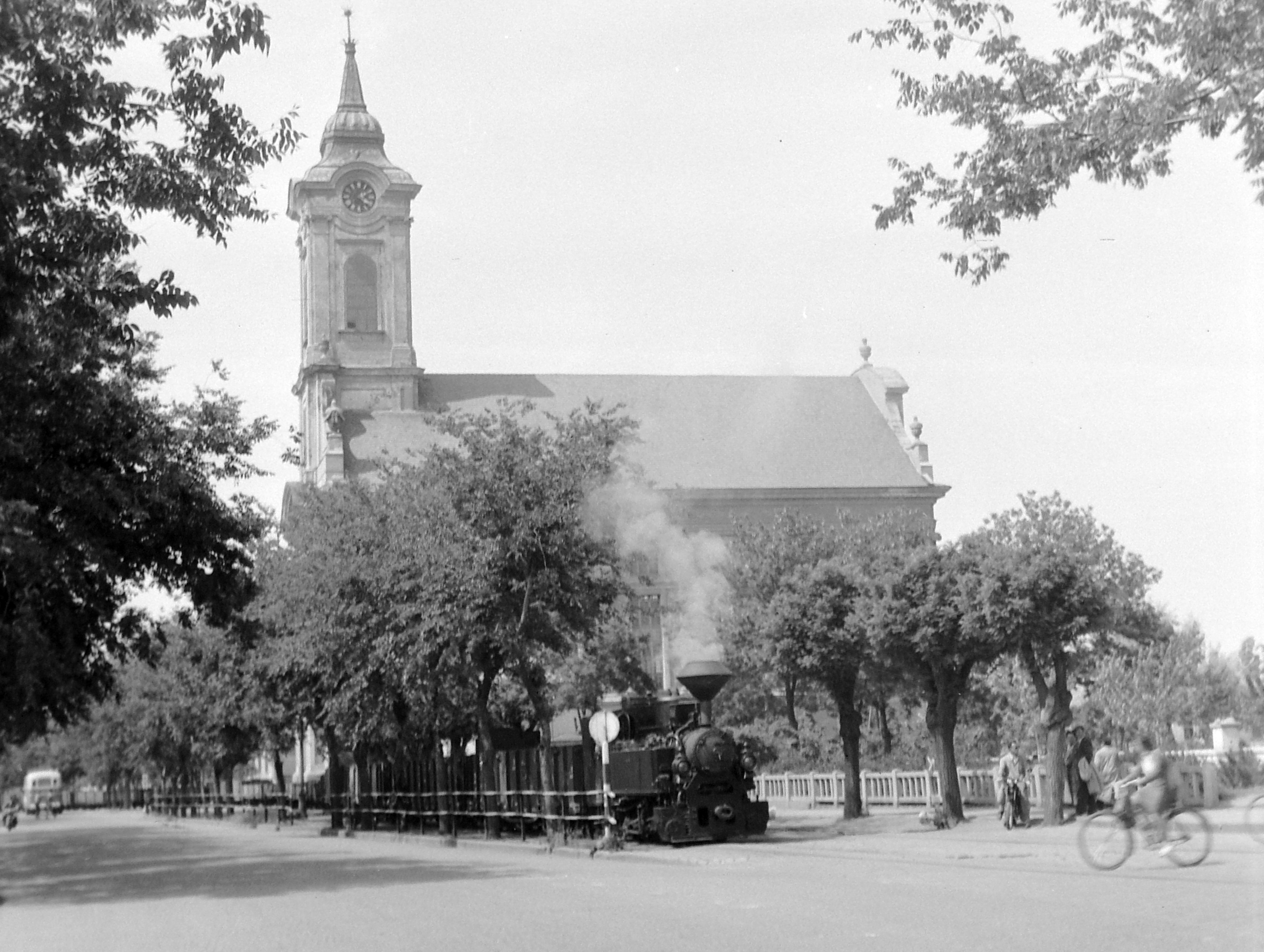 Vonat a békéscsabai evangélikus Nagytemplom előtt